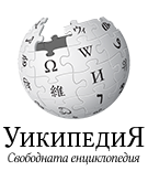 Wikipedia logo 2.0 (da)